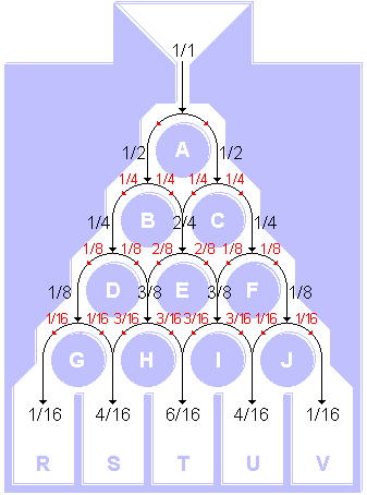 Die Mathematik des Galtonbretts